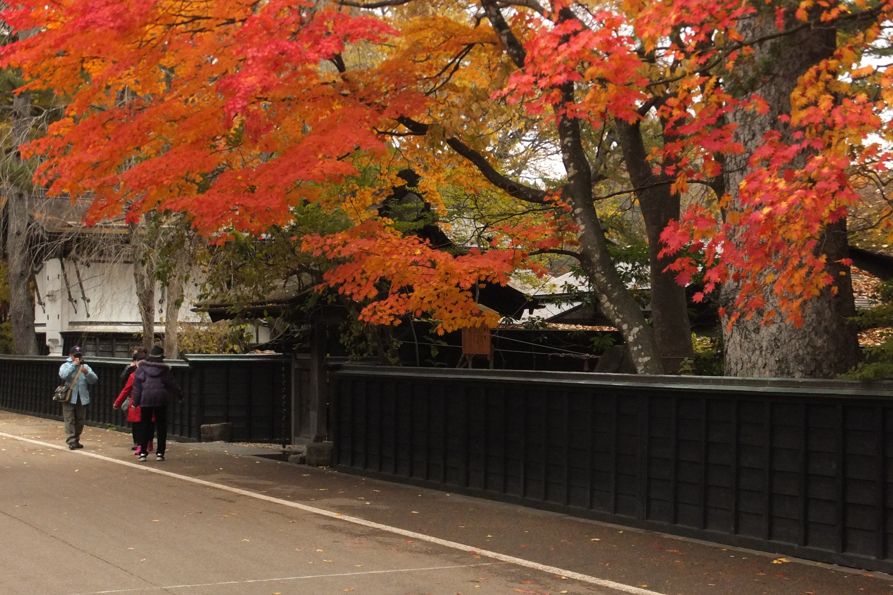 紅葉と青柳家住宅正門（秋田県仙北市角館）。武家屋敷通りより撮影